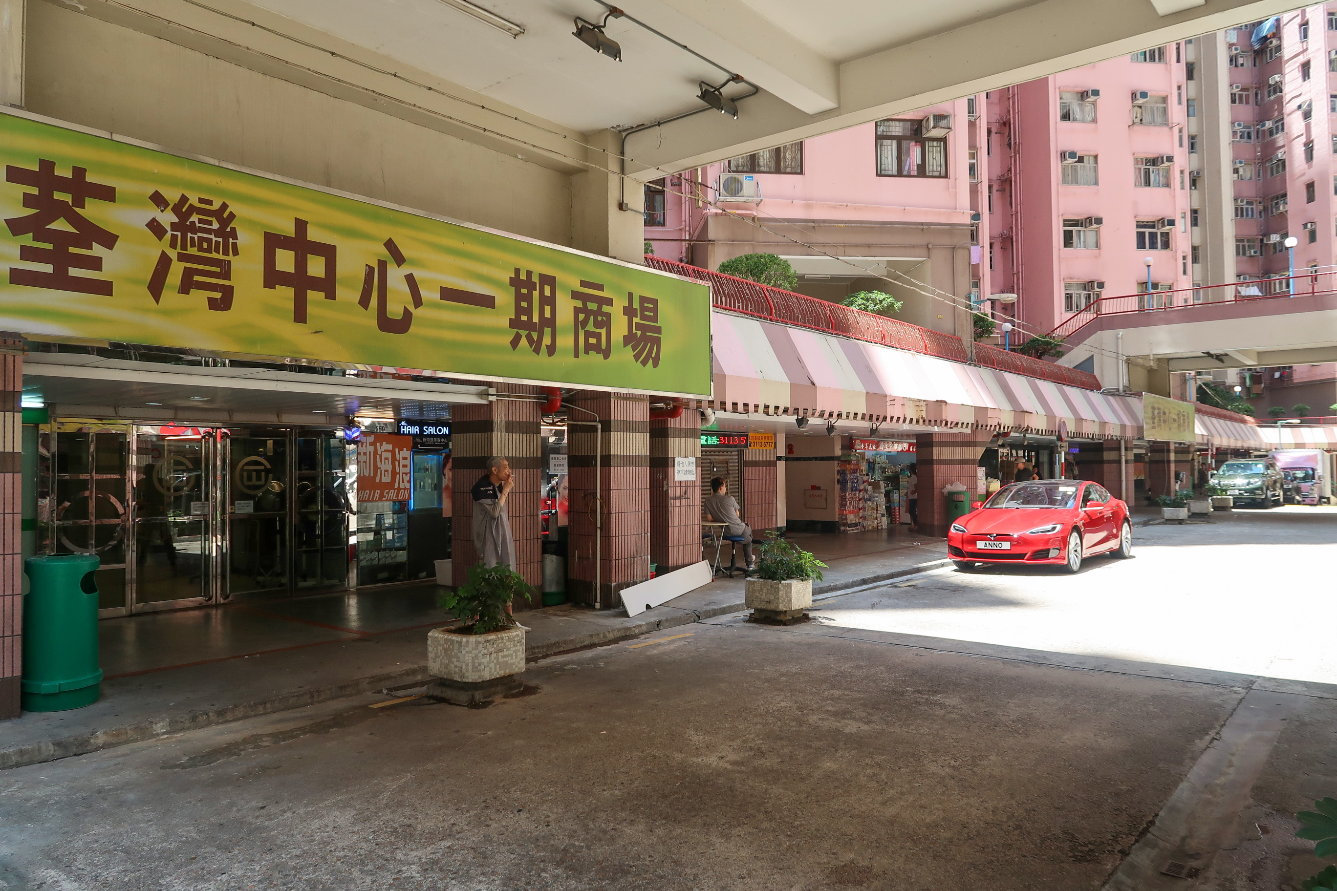 Tsuen Wan Centre